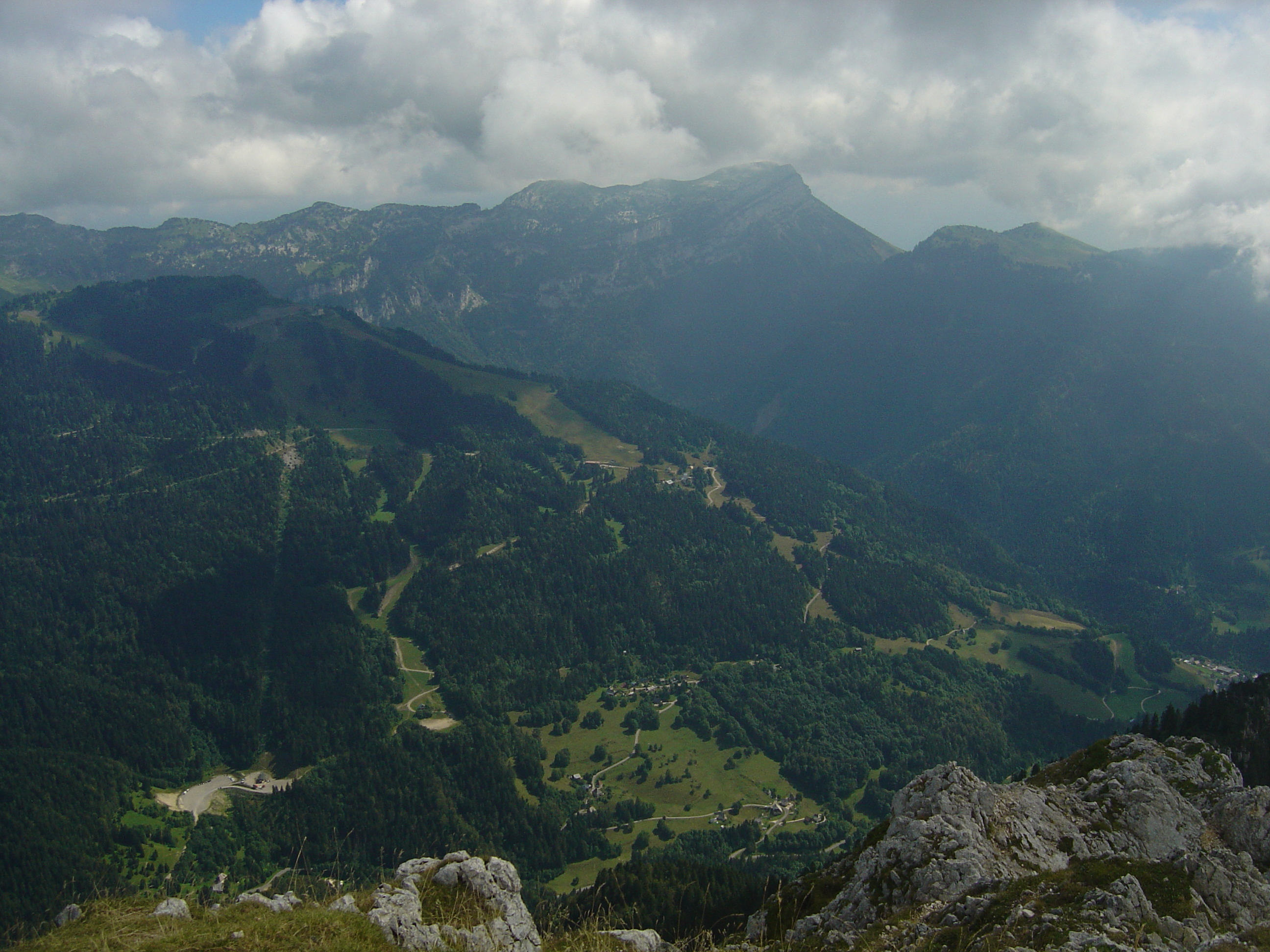 A gauche la Scia (1791m). A droite, la dent de Crolles (2062m). Tout cela vu depuis le Grand Som.